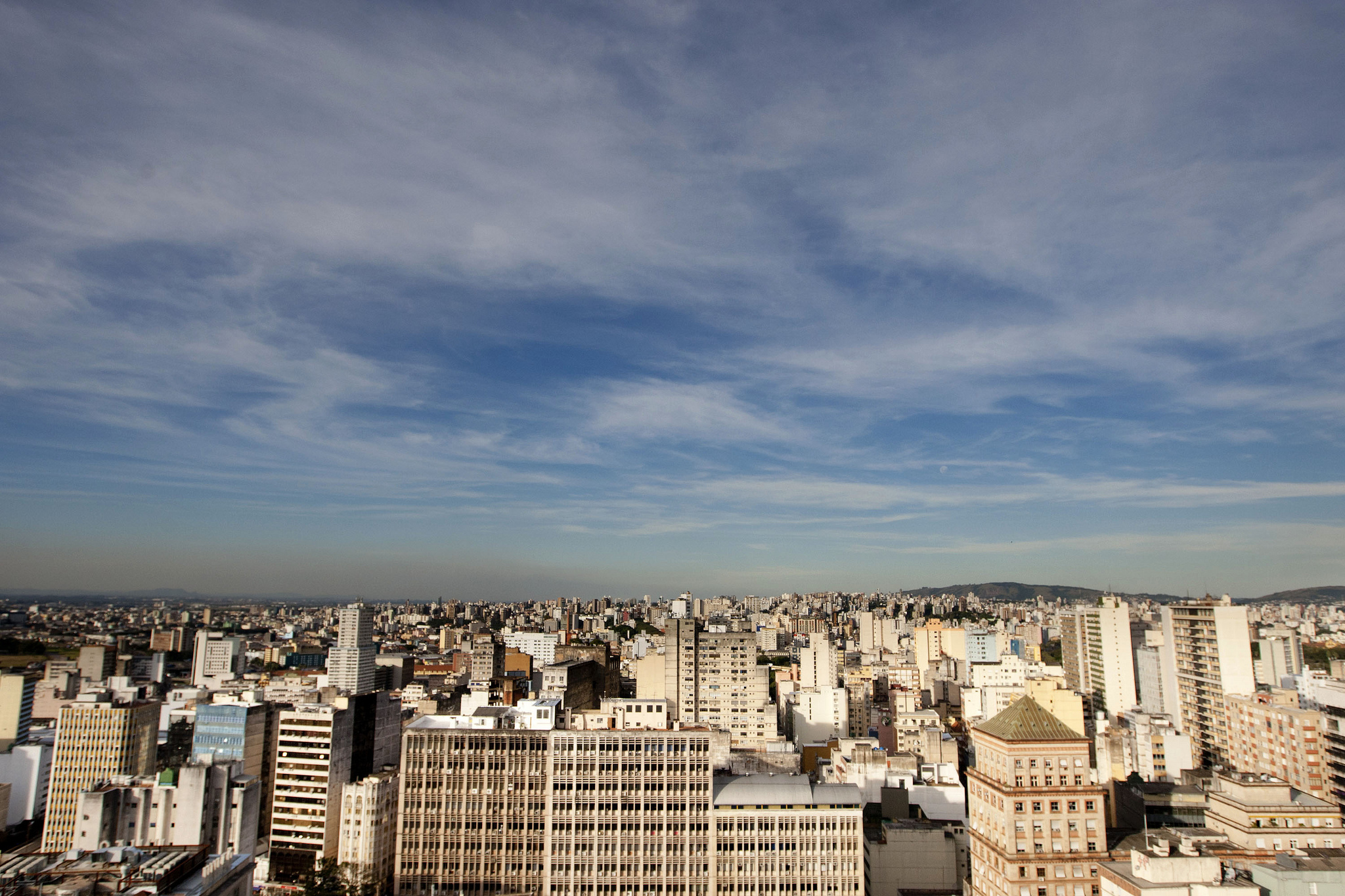 Foto feita do alto do prédio Santa Cruz, na Rua da Praia, Centro da cidade. Porto Alegre, RS - 01/06/2012 Foto: Bruna Cabrera